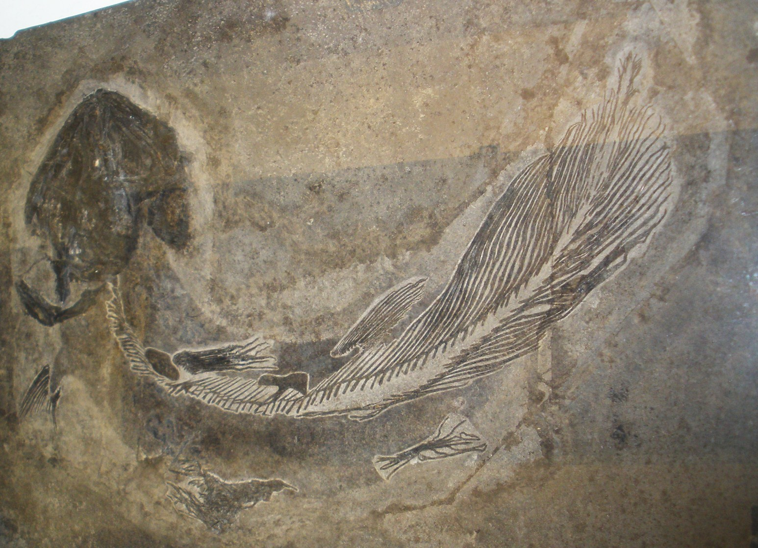 Fossil of Coelacanthus, an extinct coelacanth